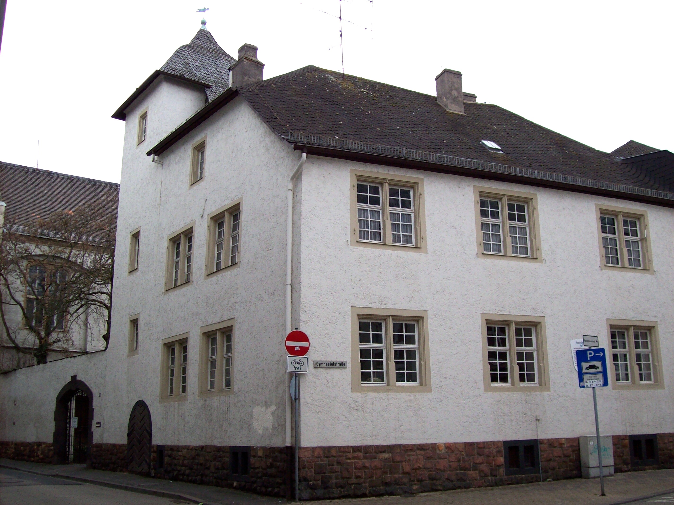 Kronenbergerhof; Burghaus vor 1685; Gebäudebestandteil des Gymnasiums an der Stadtmauer in Bad Kreuznach. Zeitweise Eigentum von der Prinzessin Henriette Amalie von Anhalt-Dessau